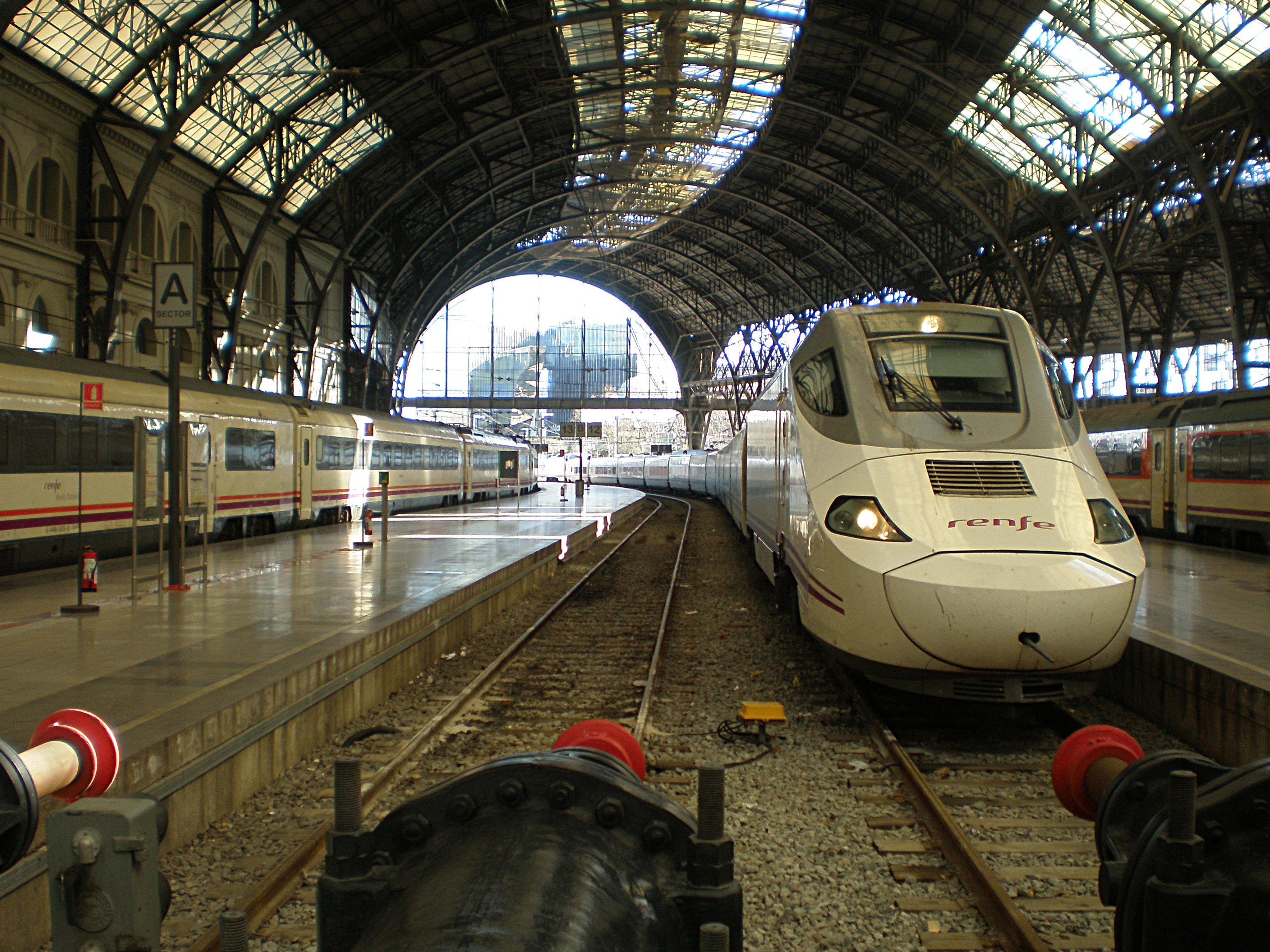 Una unidad eléctrica de la serie 130 de Renfe Operadora, en la Estació de França de Barcelona.